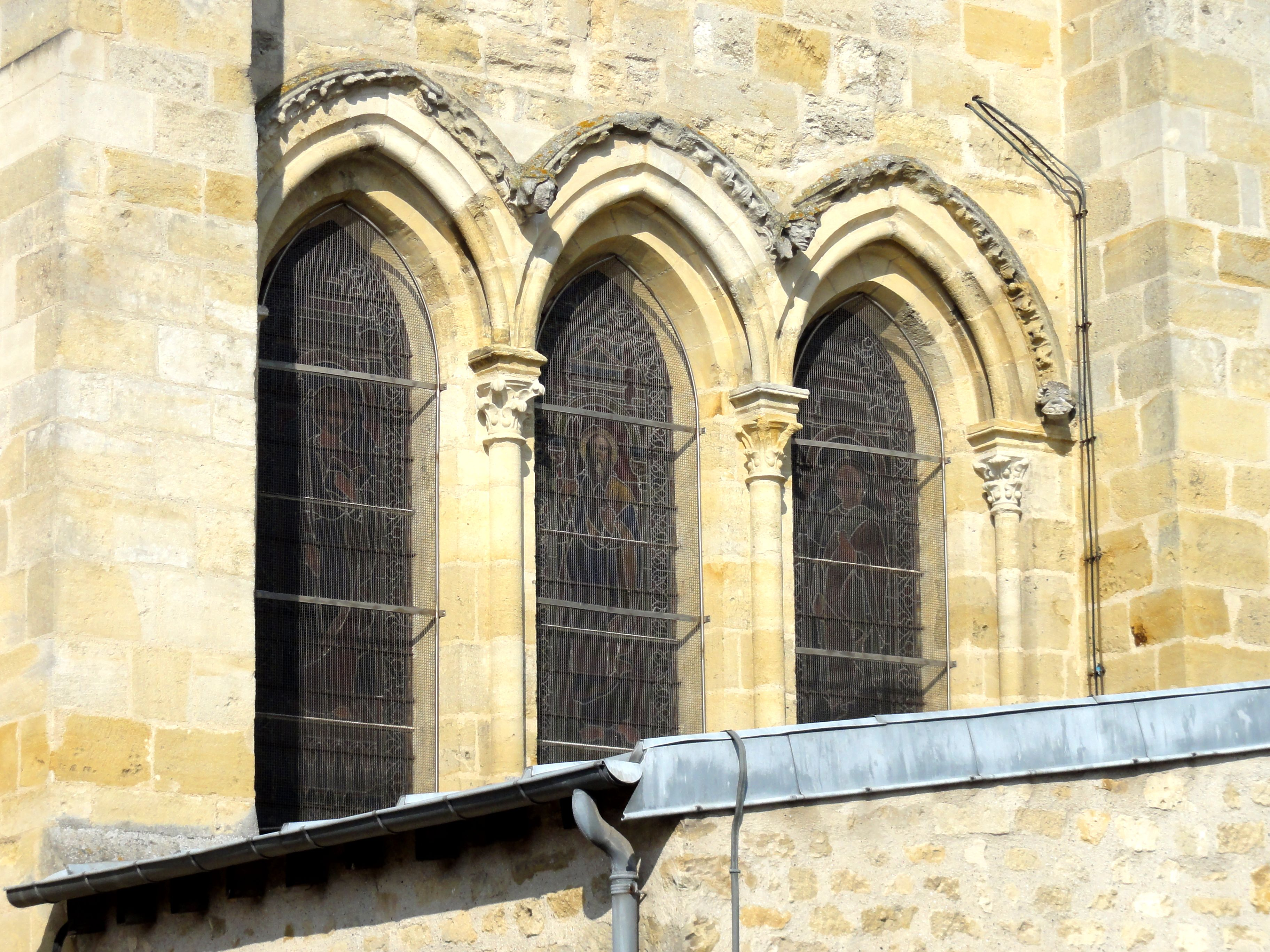 Triplet du chevet.